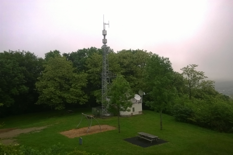 Emetteur de Vesoul